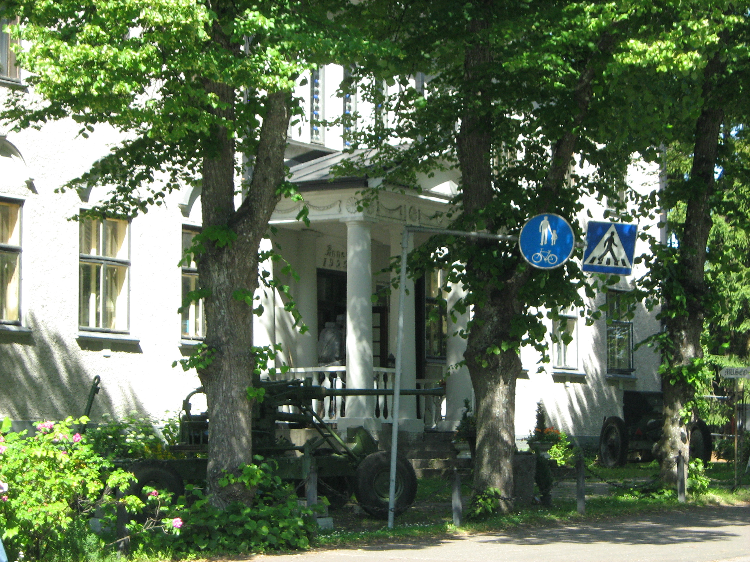 Imatran Veteraani ja Lottamuseo